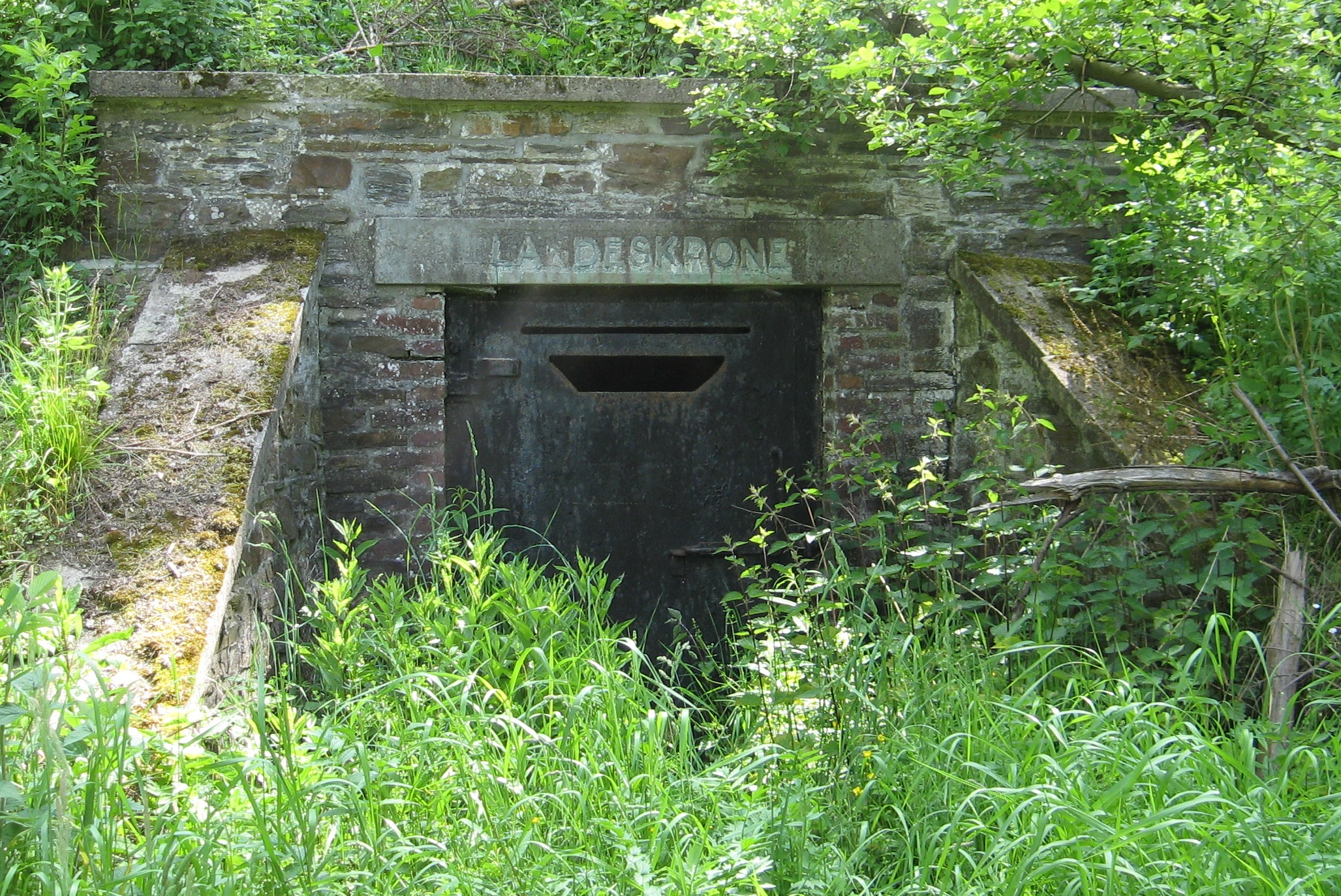 Stollenportal des Landeskroner Erbstollens bei Wilden / Siegerland